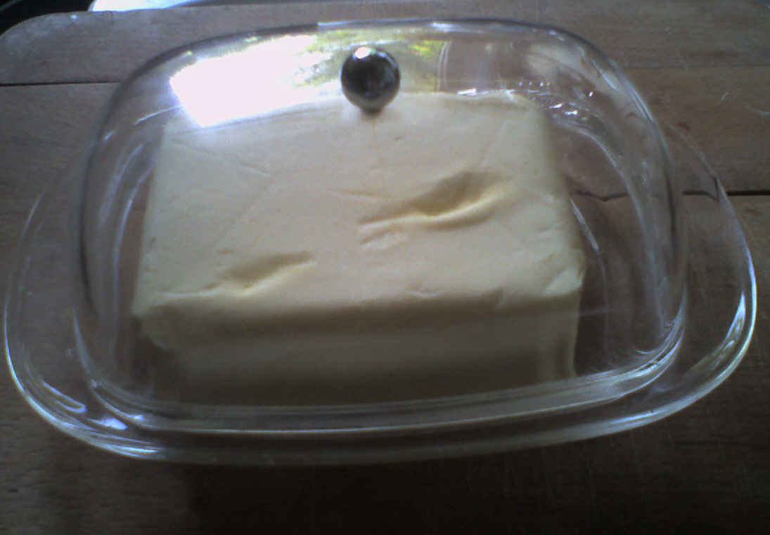 Butterdose seitlich